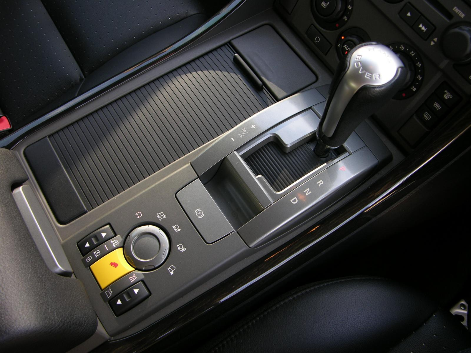 2006 Range Rover Sport HST